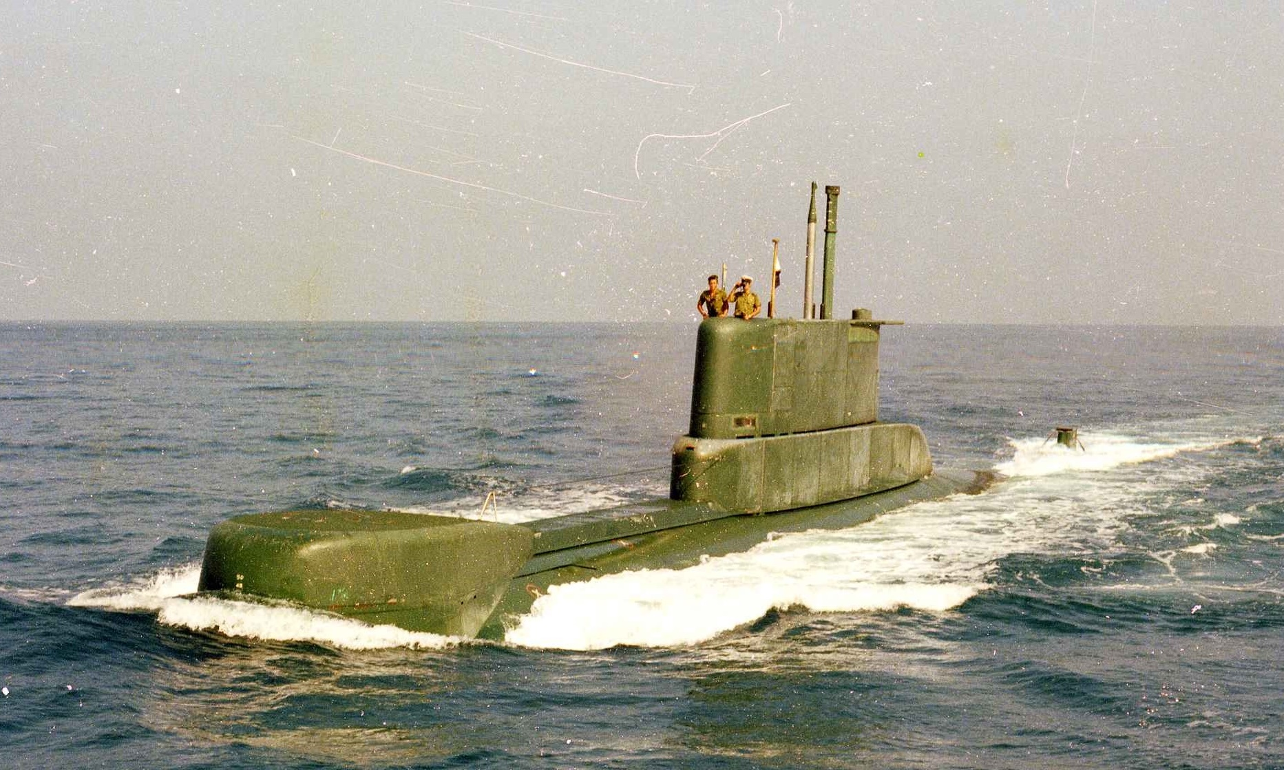 צוללת מסדרת גל